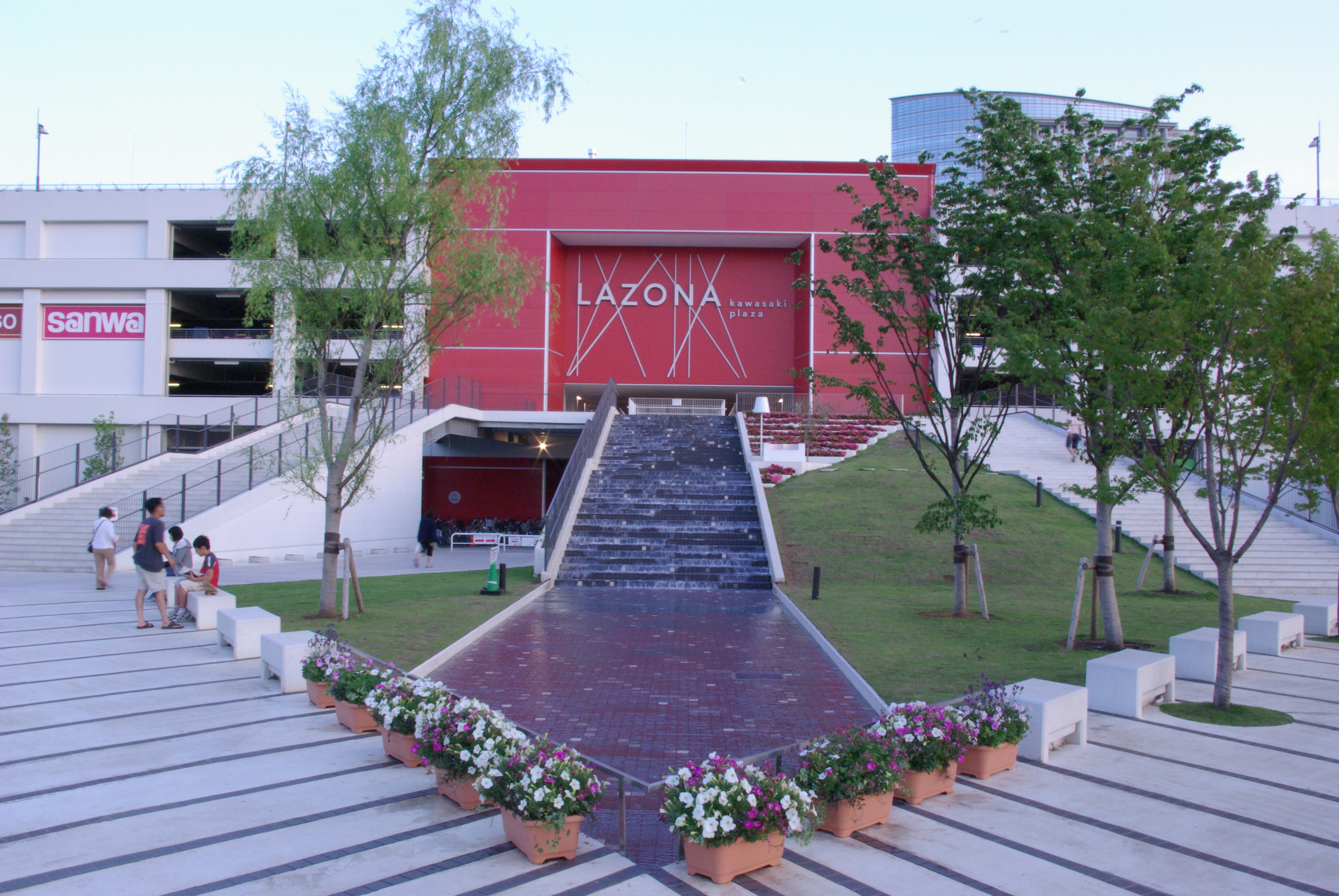 Lazona Kawasaki Plaza North View (Kawasaki, Kanagawa, Japan)